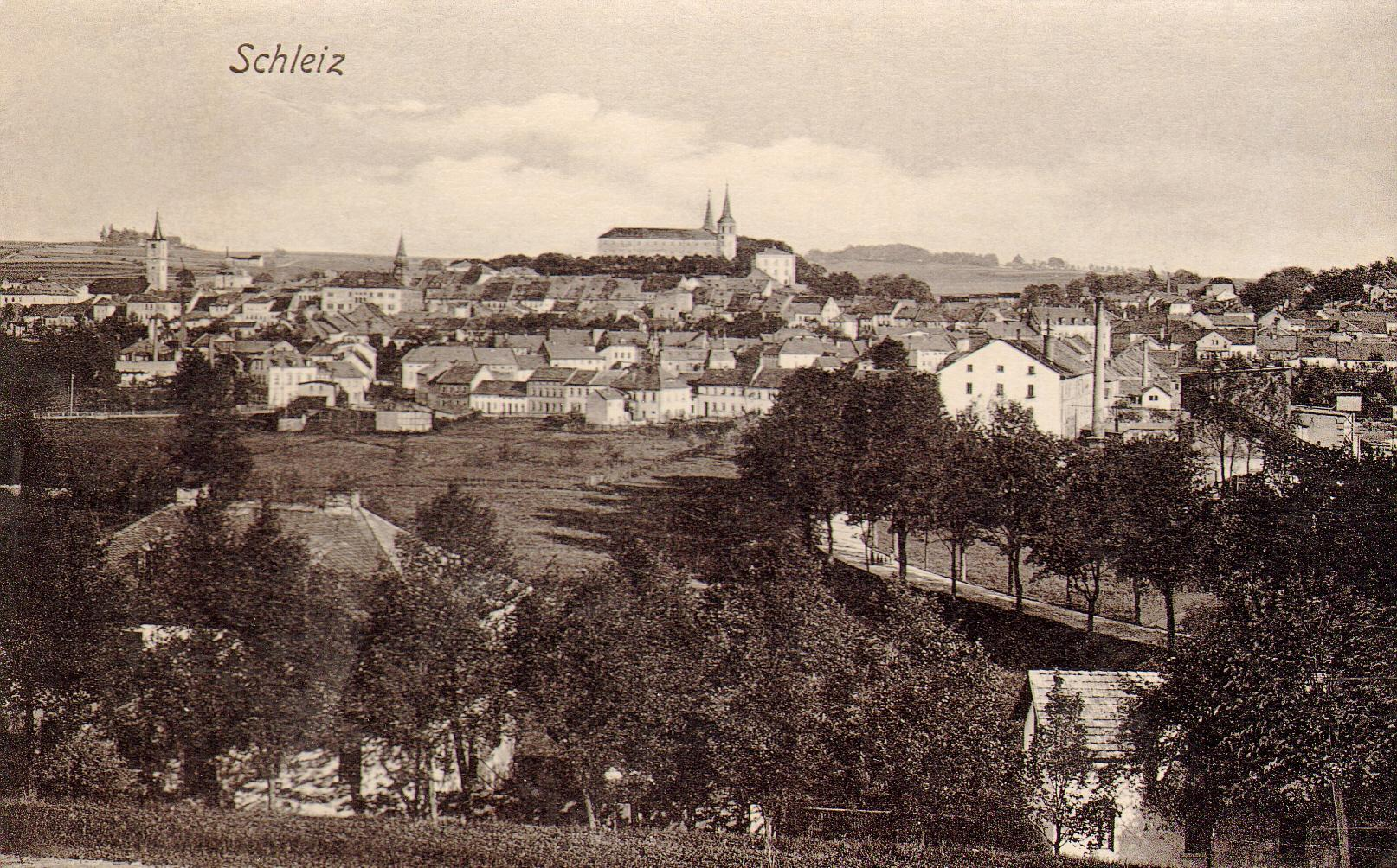 Ansichtskarte von Schleiz, 1908